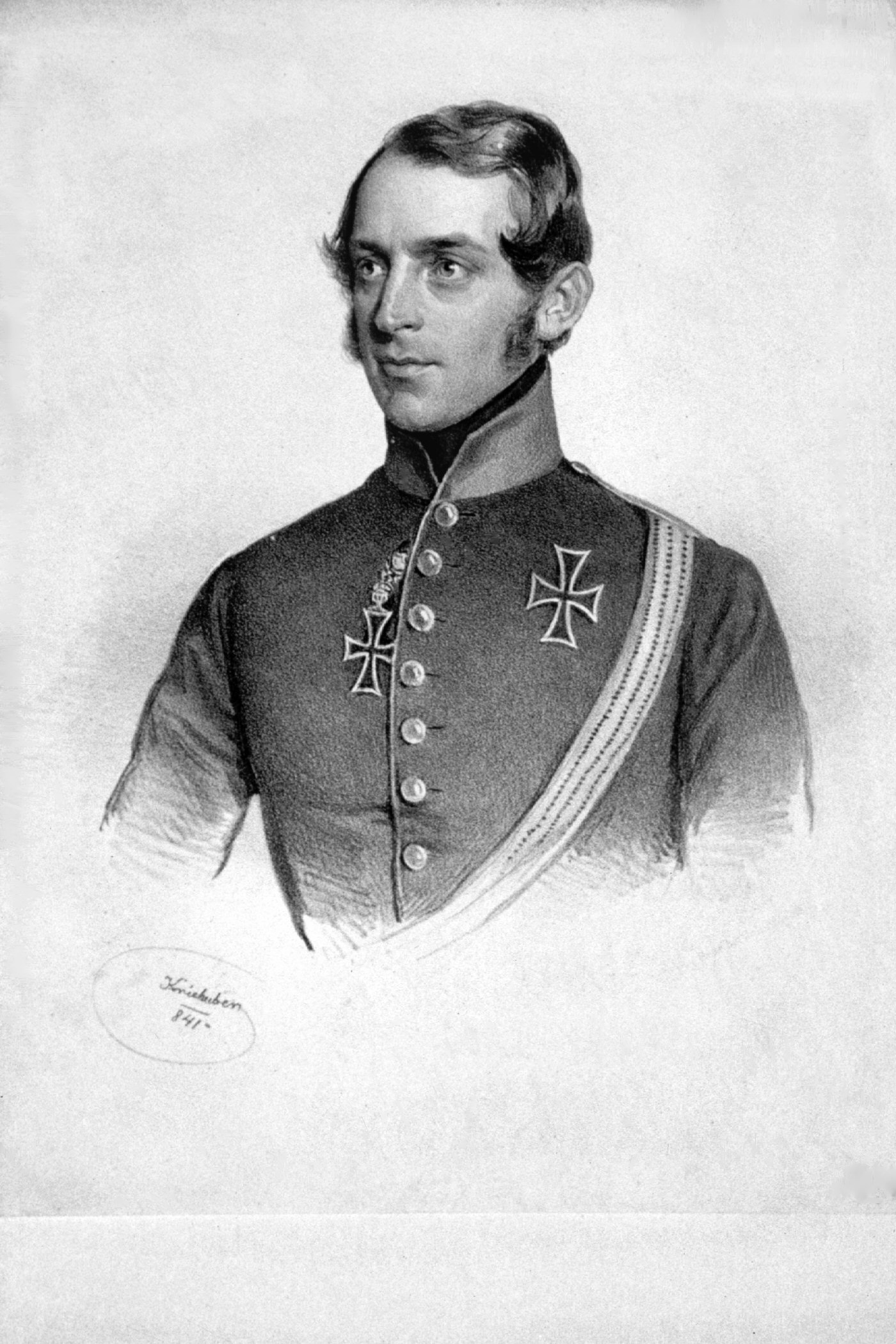 Philipp Stadion Graf zu Thanhausen und Warthausen (1799-1868), k. k. General, Großkapitular des Deutschen Ordens. Lithographie von Josef Kriehuber, 1841